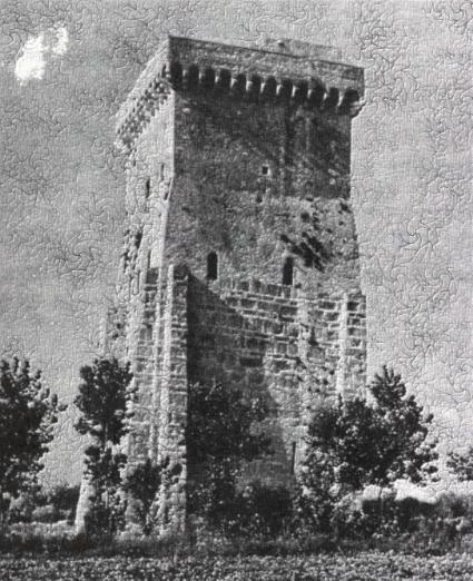 (cartolina) - Torre di Pandolfo Capodiferro edificata nel X secolo sulla riva sinistra alla foce del fiume Garigliano, e purtroppo distrutta nella Seconda Guerra Mondiale (novembre 1943).